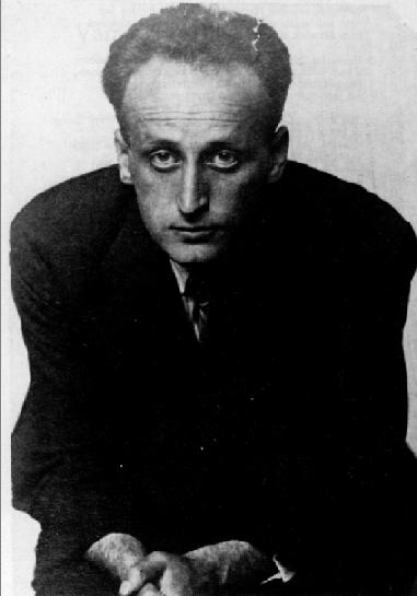 Szabó Lajos portréja